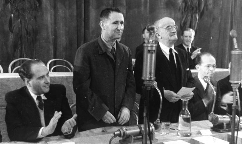 Berlin, Intellektuelle bei Friedenskundgebung ADN-Zentralbild Friedenskundgebung des Kulturbundes am 24.10.1948 in der Deutschen Staatsoper (Admiralspalast) in Berlin. Unter dem Motto "Verteidigung des Friedens ist Verteidigung der Kultur" treten namhafte Vertreter der Kultur- und Geistesschaffende auf und fordern, dem Krieg den Kampf anzusagen, damit der Frieden Wirklichkeit wird. U.B.z.: v.l.n.r.: Julius Hay, Bert Brecht, Ernst Legal, Alexander Abusch. 5050-50 Abgebildete Personen: Brecht, Bertolt: Schriftsteller, Regisseur, DDR Hay, Julius: Schriftsteller, Ungarn (PND 118547313) Legal, Ernst: Schauspieler, Regisseur, Generalintendant Staatsoper Berlin, DDR (PND 118727079) Abusch, Alexander: Minister für Kultur, Mitglied des ZK der SED, DDR